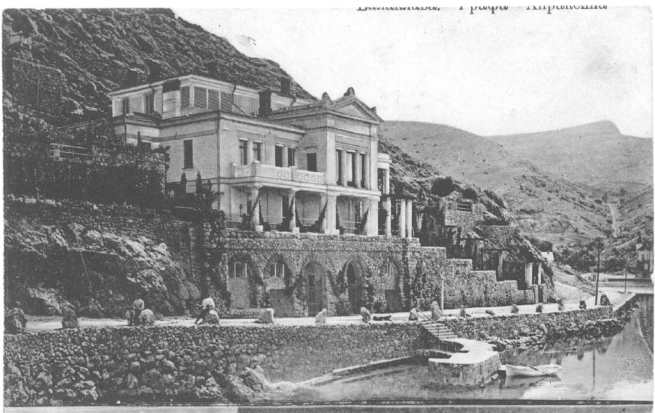 Apraksin's Palace